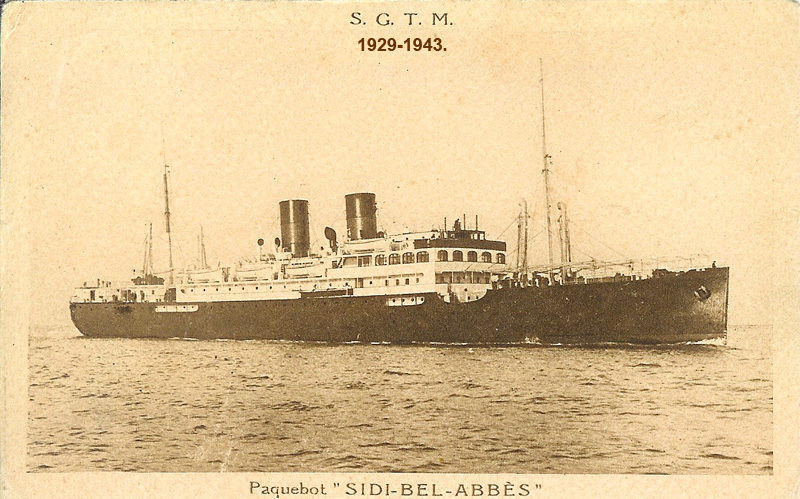 Carte postale du Sidi Bel Abbès (1929-1943)